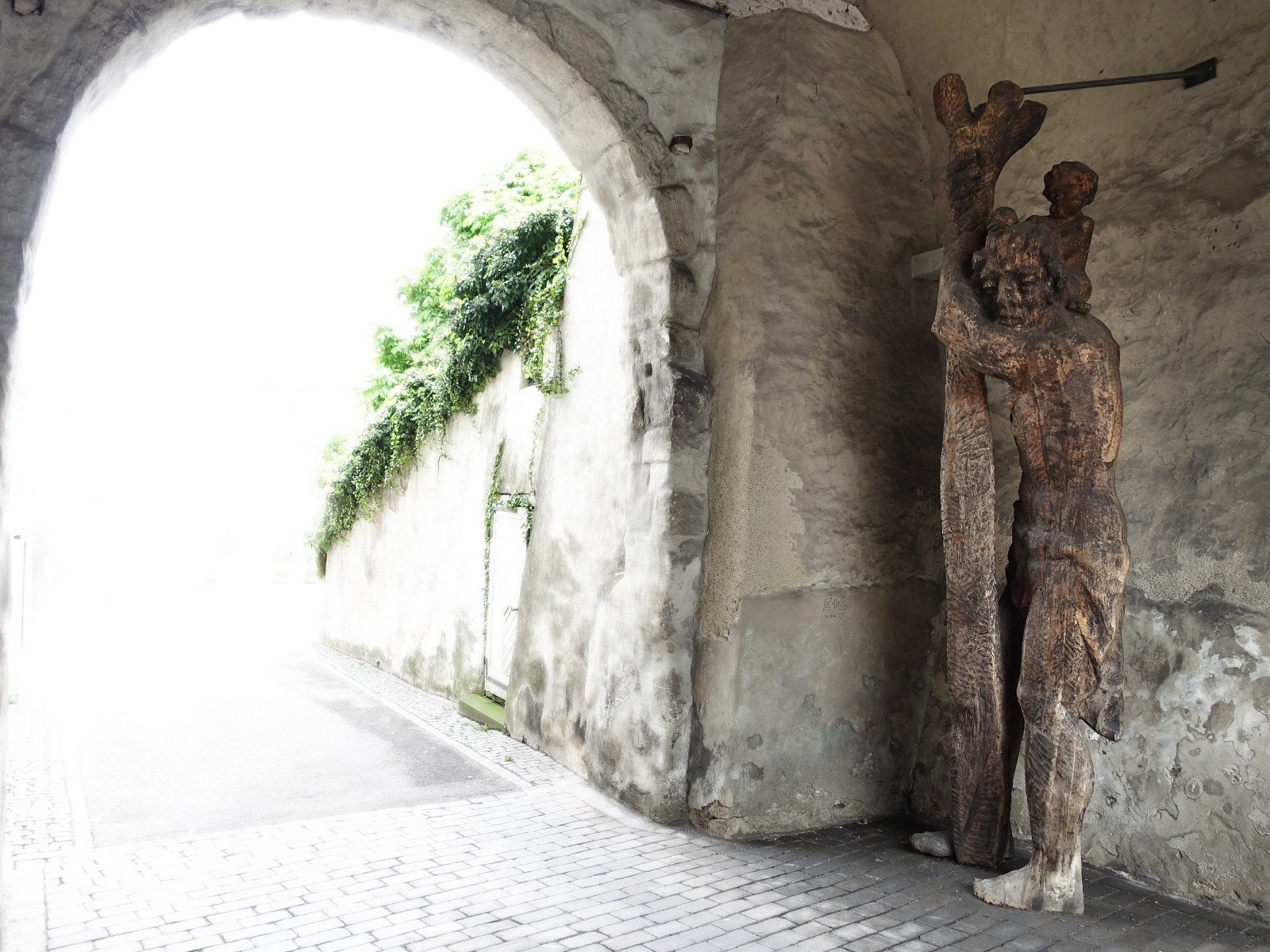 1950, Holz Skulptur Christophorus, Schnetztor von Wil, St. Gallen. Von Urban Blank, Bildhauer, Maler, Pädagoge